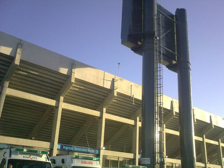 Pantalla Estadio San Juan del Bicentenario